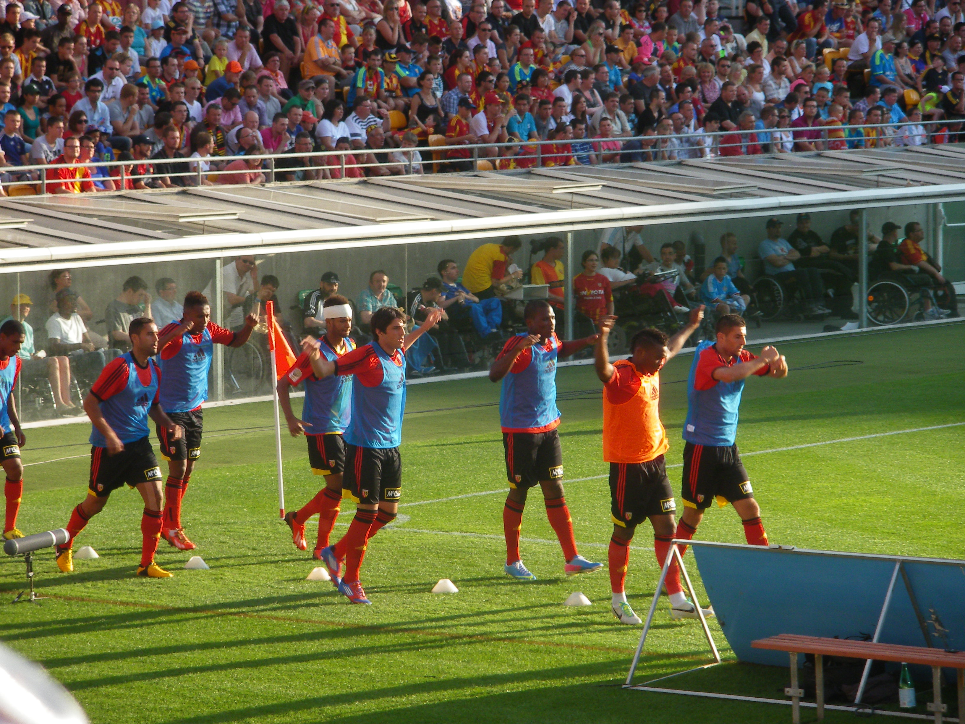 Vue des remplaçants lensois du match amical RC Lens-Olympique de Marseille du 24 juillet 2013.